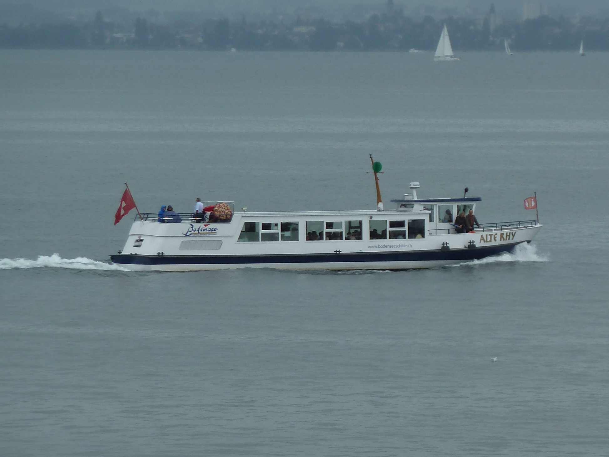 Die Alte Rhy auf Kurs Altnau - Immenstaad - Hagnau.